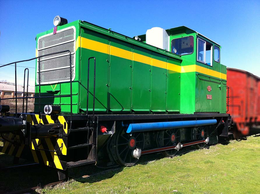 Locomotora-tractor dièsel 10465